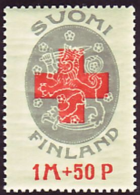 Первая почтово-благотворительная марка Финляндии, 1922